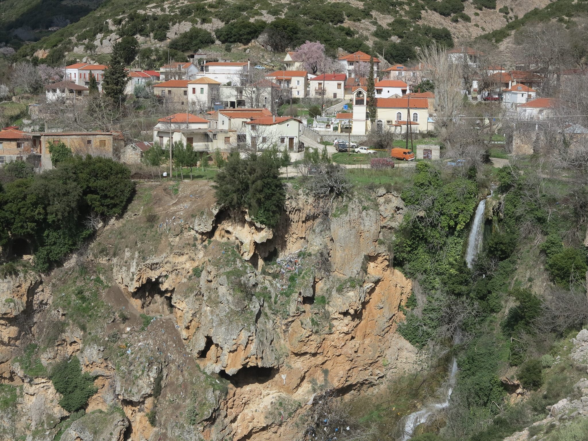 Πανοραμική άποψη του χωριού Καταράκτης, με το νερό να τρέχει.